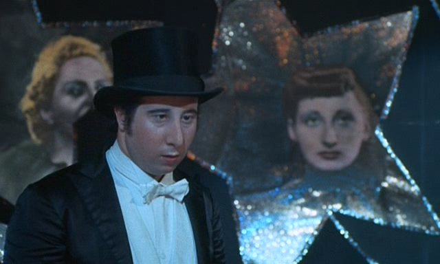 Fotogramma dal film di Federico Fellini Roma Catturato da Pakdooik